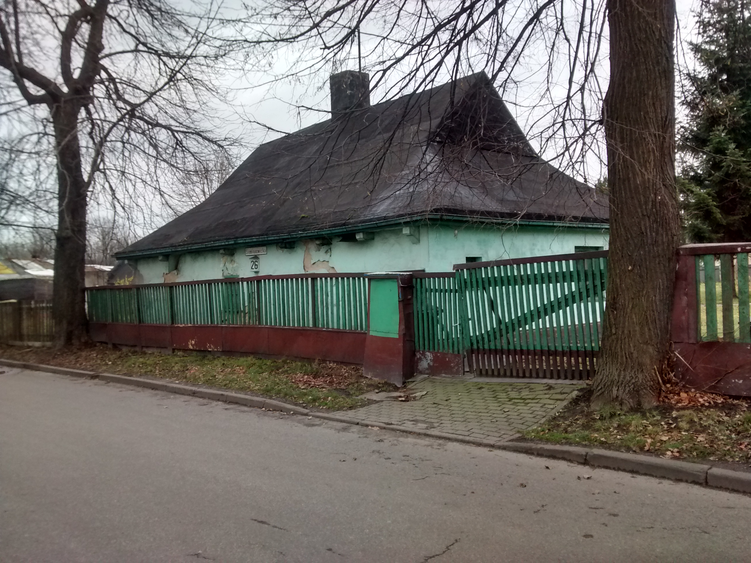 Budynek z połowy XIX wieku przy ul. Siemianowickiej 26 w Katowicach /dzielnica Dąbrówka Mała/